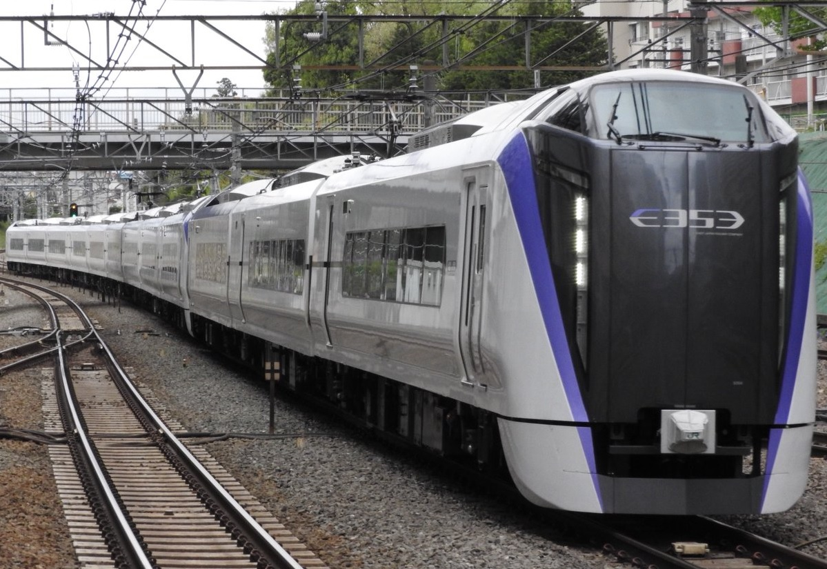 E353系「スーパーあずさ号」。国分寺駅。